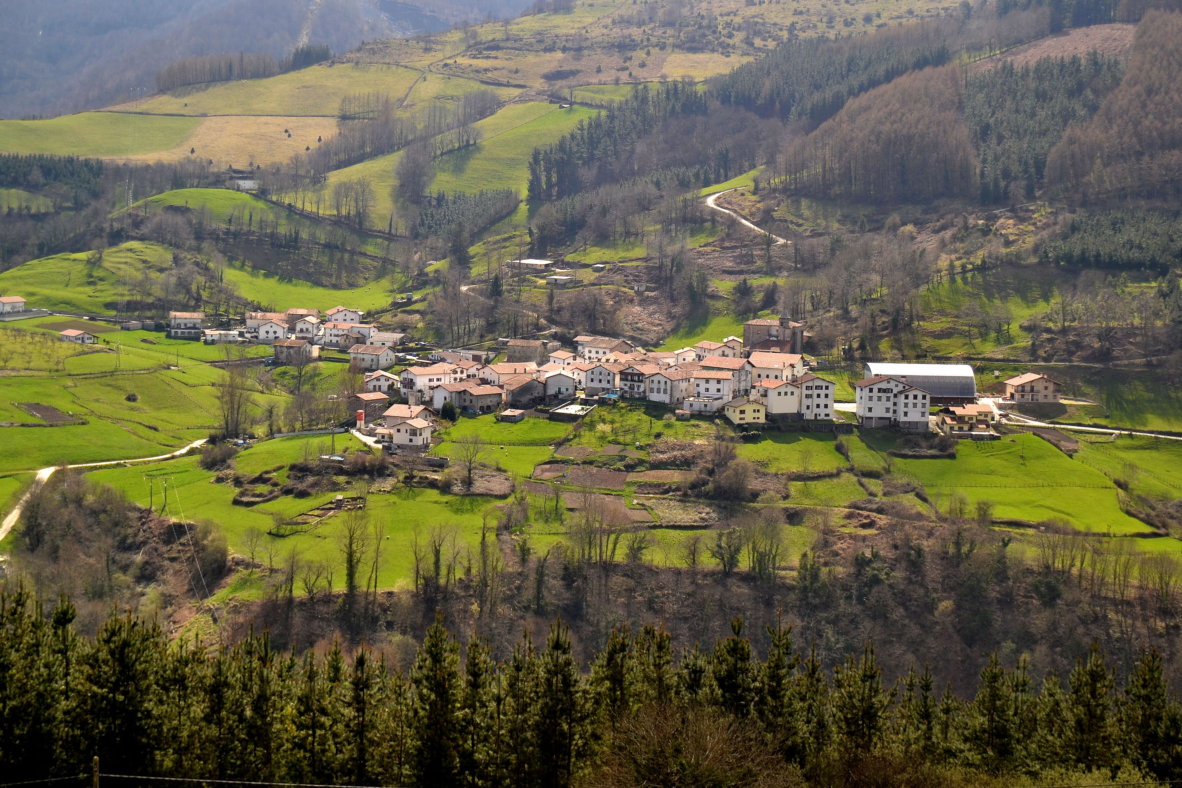 Eratsun. Malerreka, Nafarroa. Euskal Herria. Eratsun. Malerreka, Navarre. Basque Country.